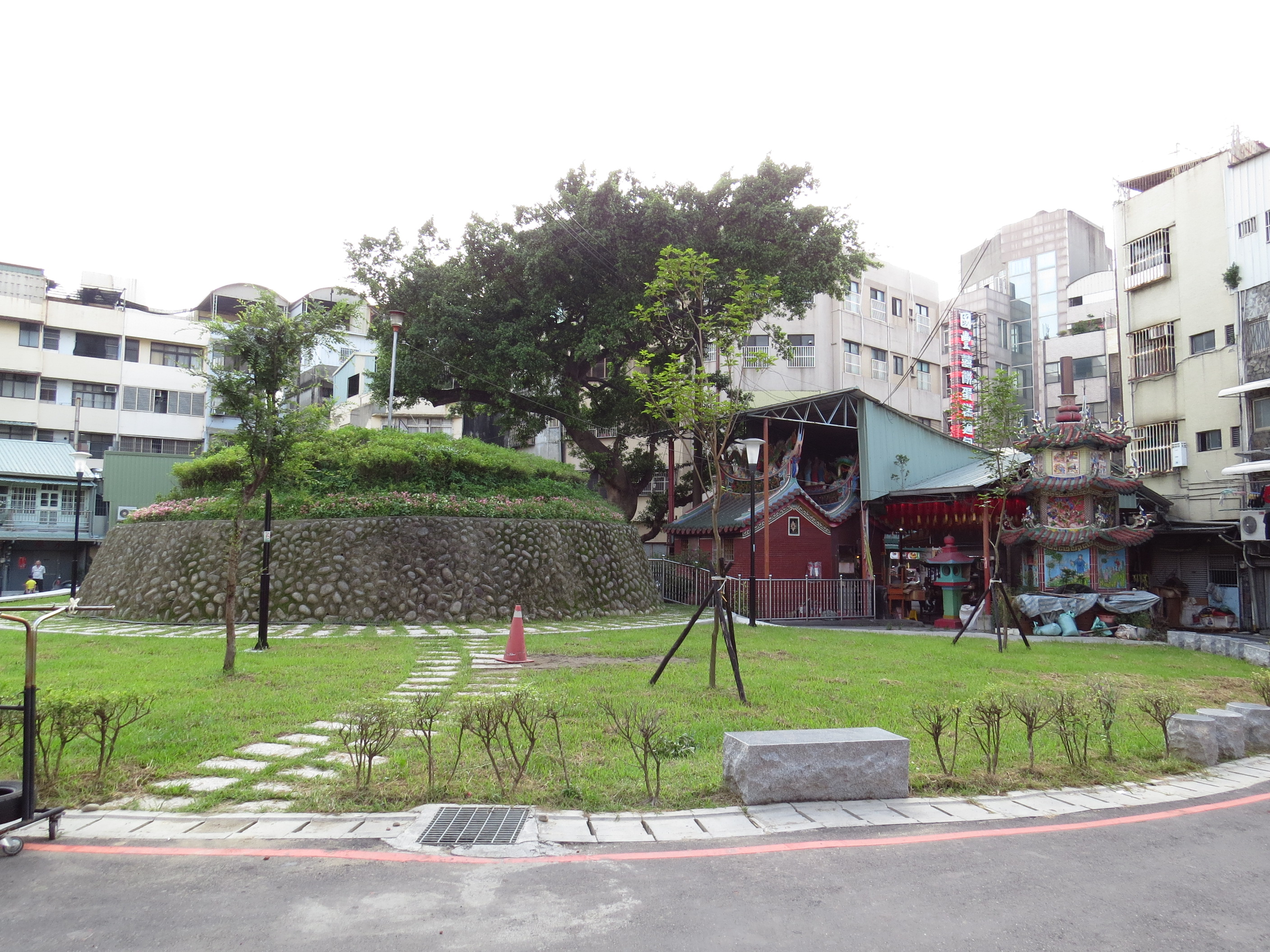 中文（台灣）: 葫蘆墩遺址（墩腳），在臺中市豐原區大街尾福德祠後方。